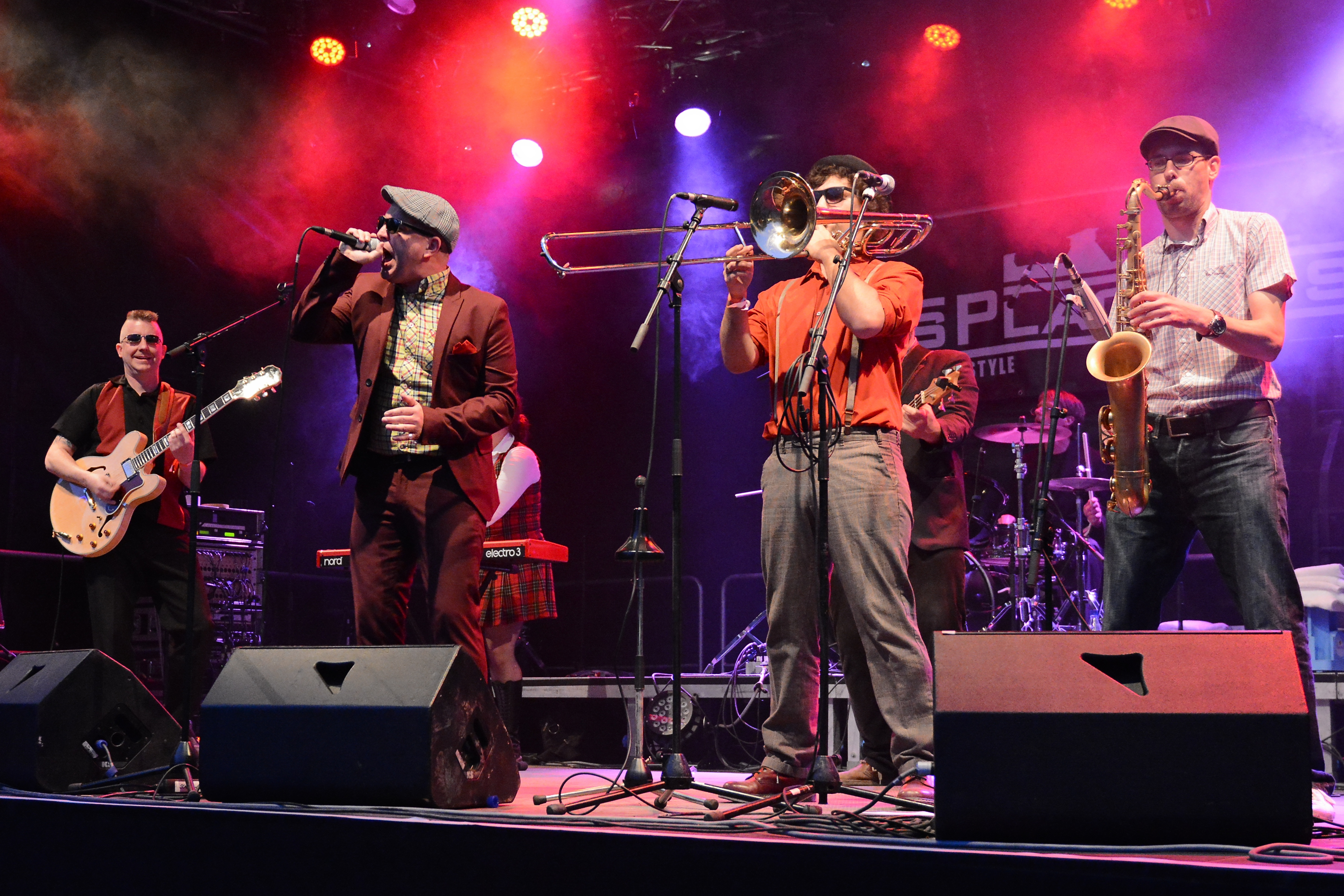 Los Placebos beim Traumzeit-Festival 2014